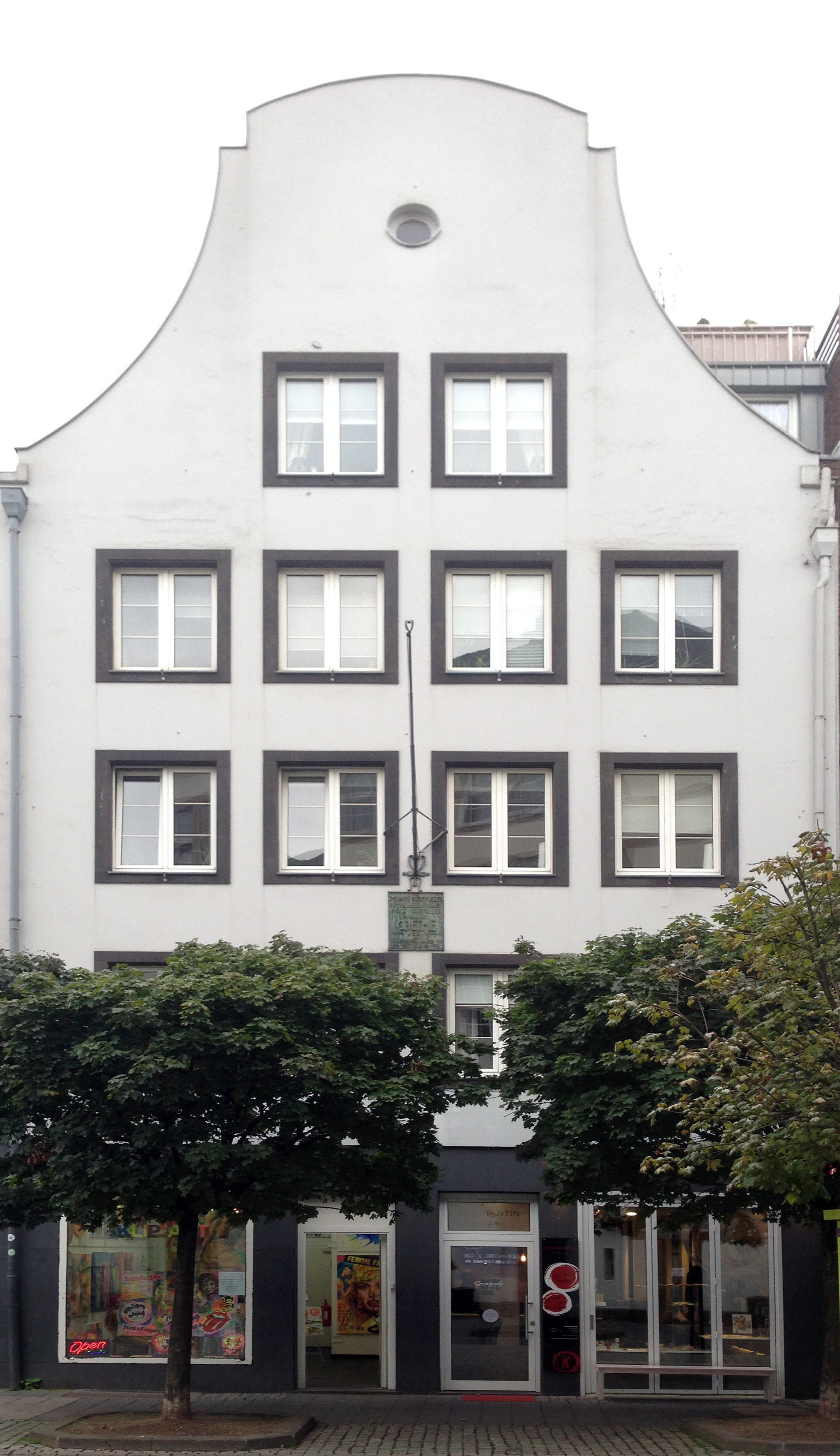 Haus zum „Prinz von Oranien“, Burgplatz 12, Düsseldorf-Altstadt mit Bronzetafel: „In diesem Hause dem früheren Gasthof Prinz von Oranien wohnte Goethe im Juli 1774“.